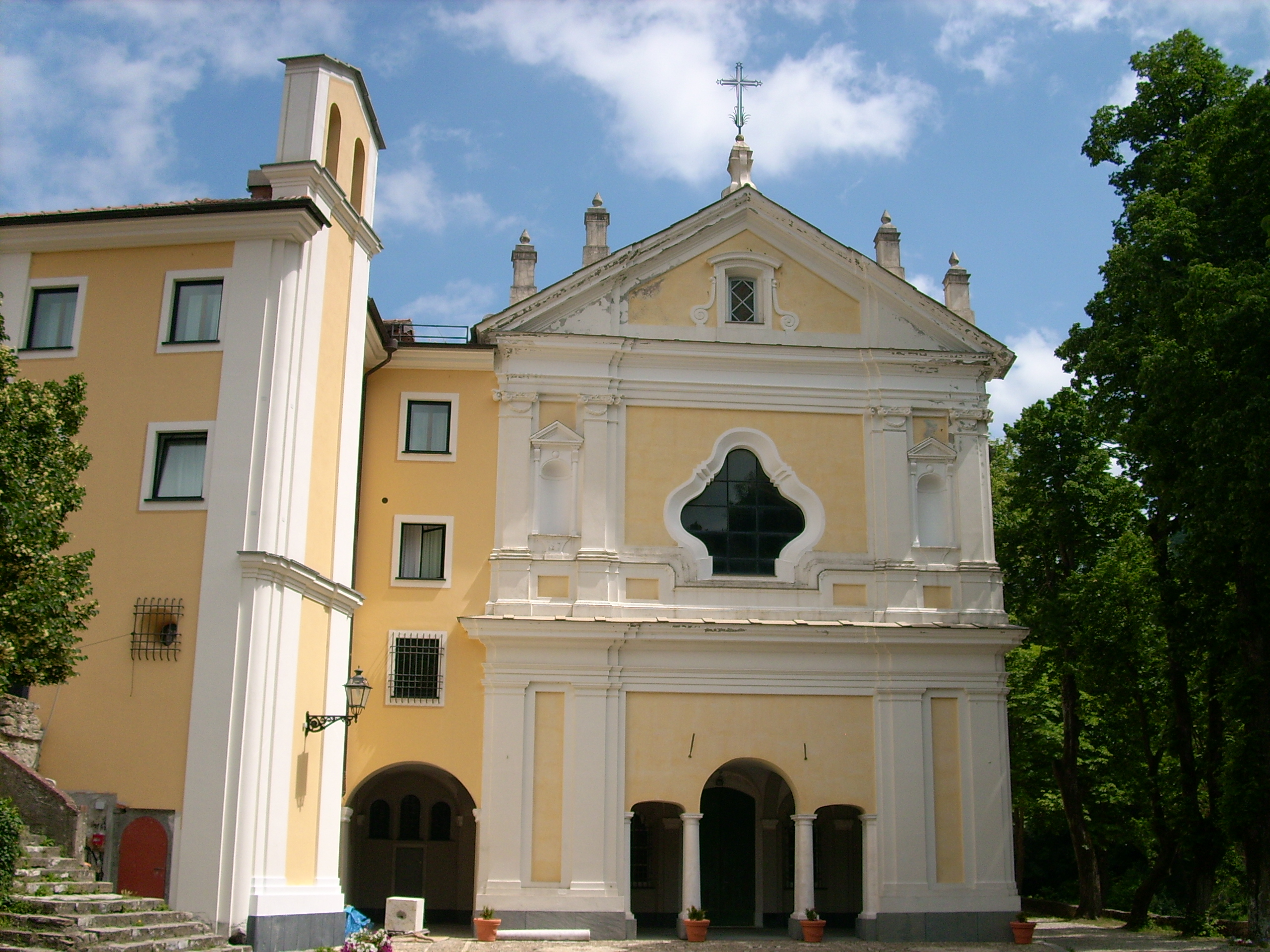 Santuario di Nostra Signora delle Tre Fontane presso Montoggio, Liguria, Italia